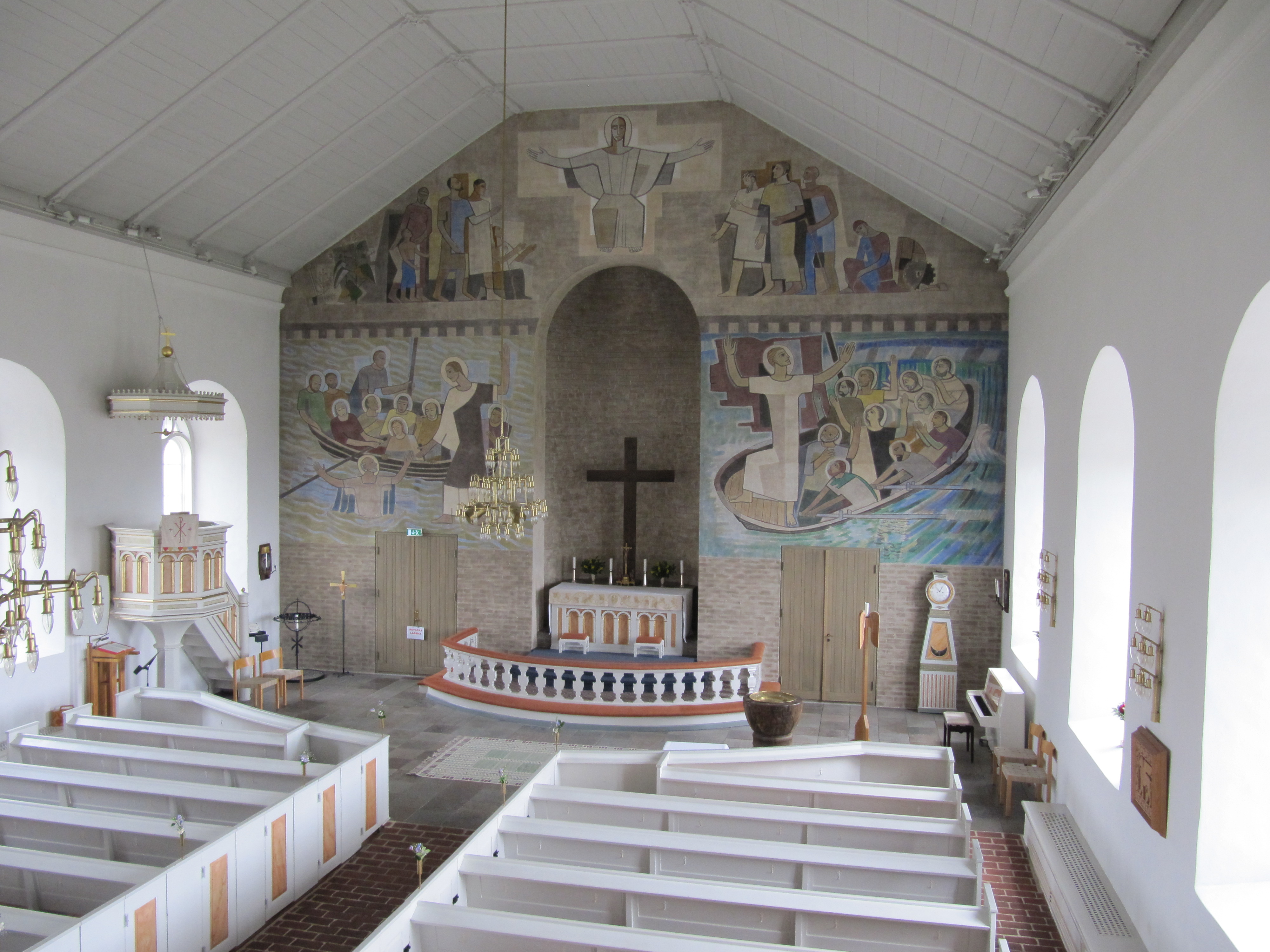 Kyrkorum i Förslövs kyrka